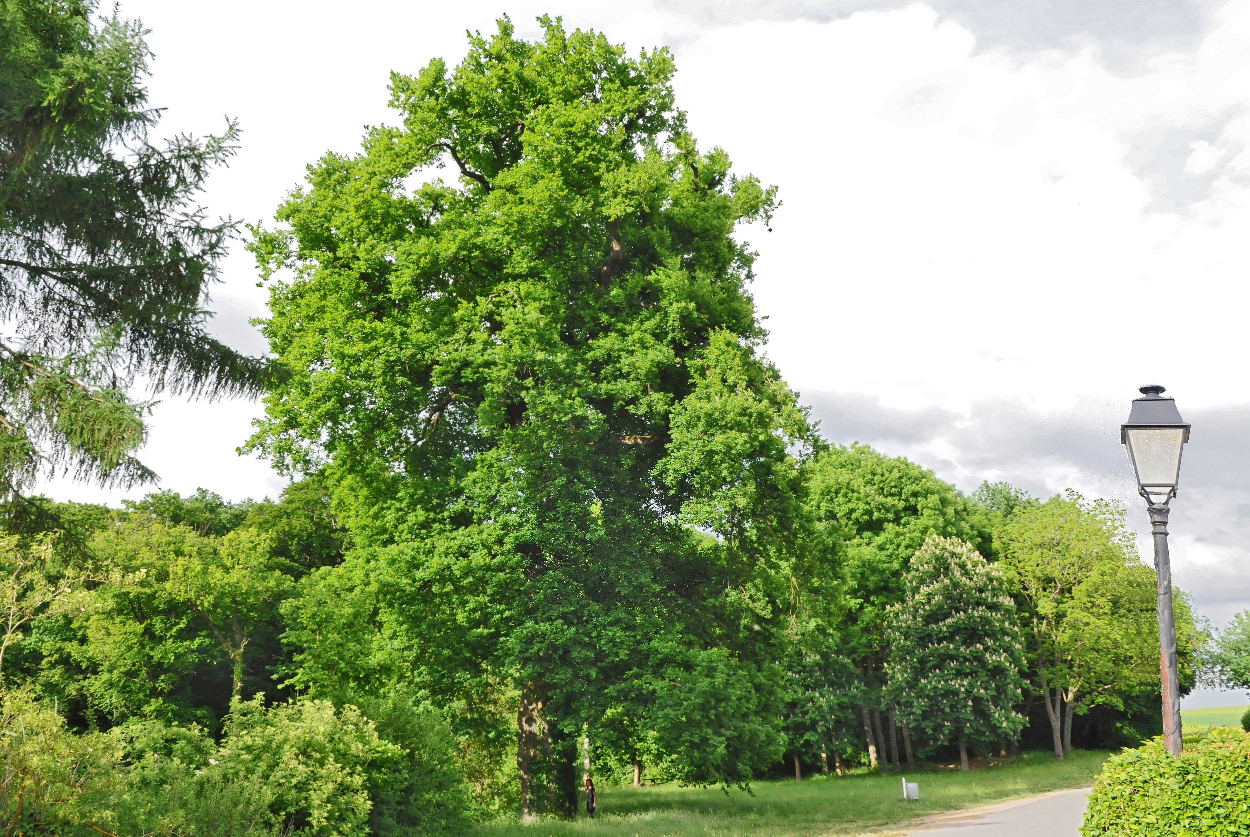 Le chêne pédonculé remarquable à Moutfort (Luxembourg)